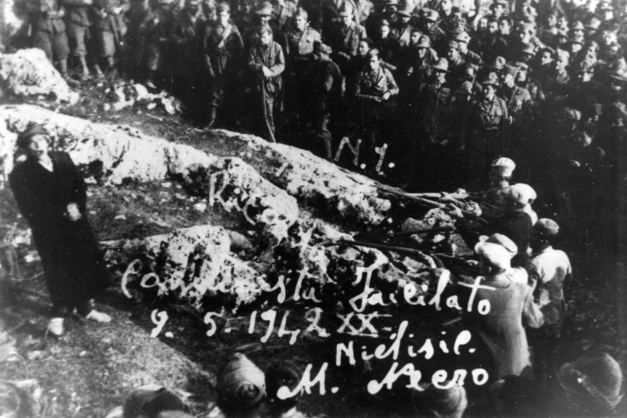 Srpskohrvatski / српскохрватски: Javno streljanje narodnog heroja Čedomira Ljuba Čupića u Nikšiću 5. maja 1942. godine.